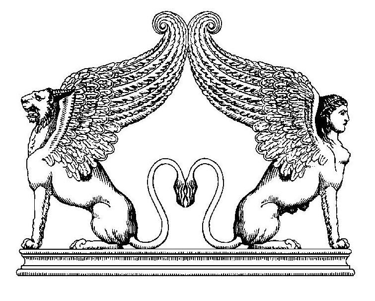 Logo Livraphone